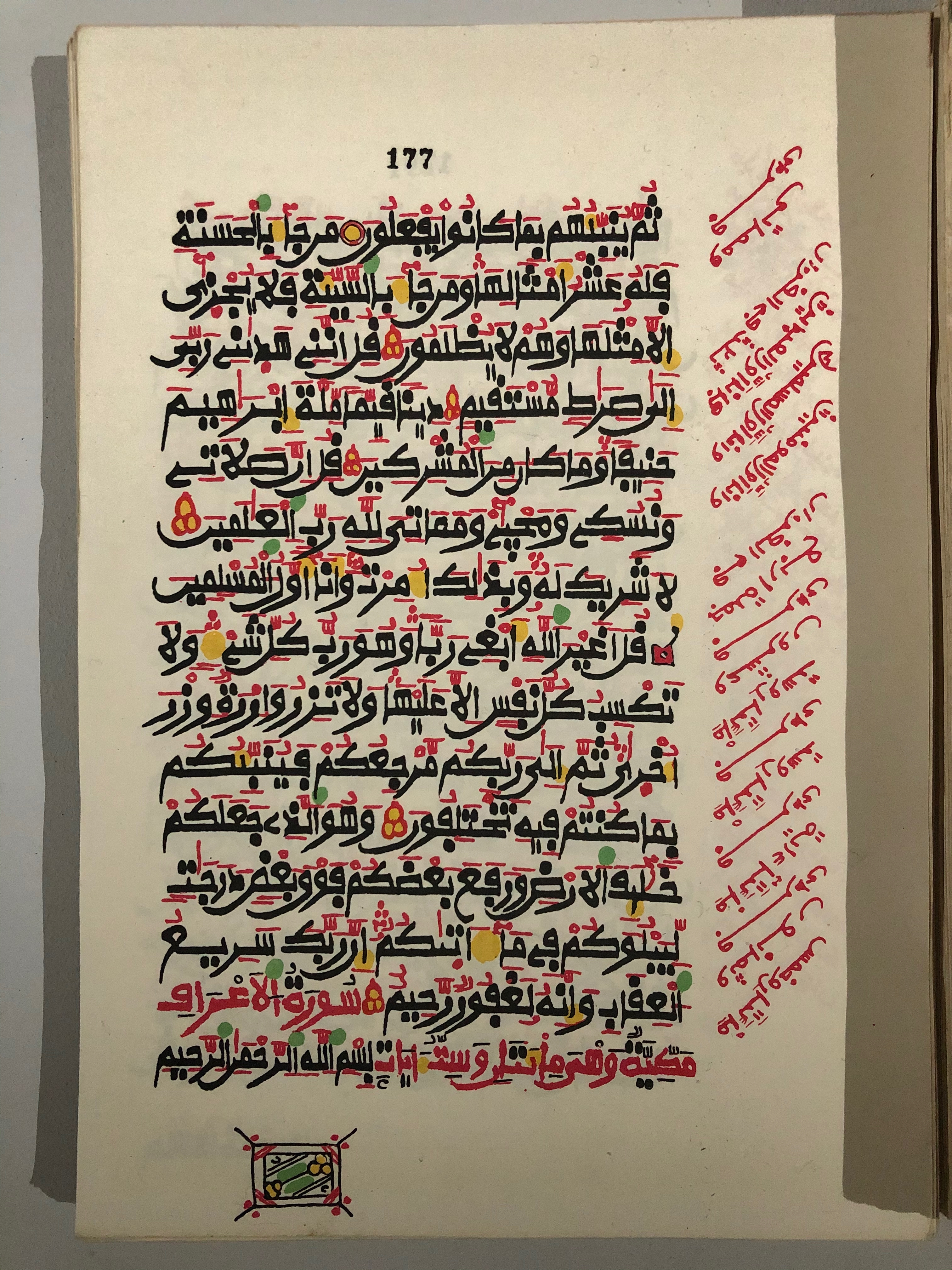 مصحف القرآن الكريم مطبوع بمطبعة حجرية بخط هاوساوي. نيجيريا. أوائل القرن العشرين. نسخة. Collection C. Harmès Vincennes. من معرض كنوز الإسلام في إفريقيا بمتحف محمد السادس للفن الحديث والمعاصر بالرباط، عام 2019